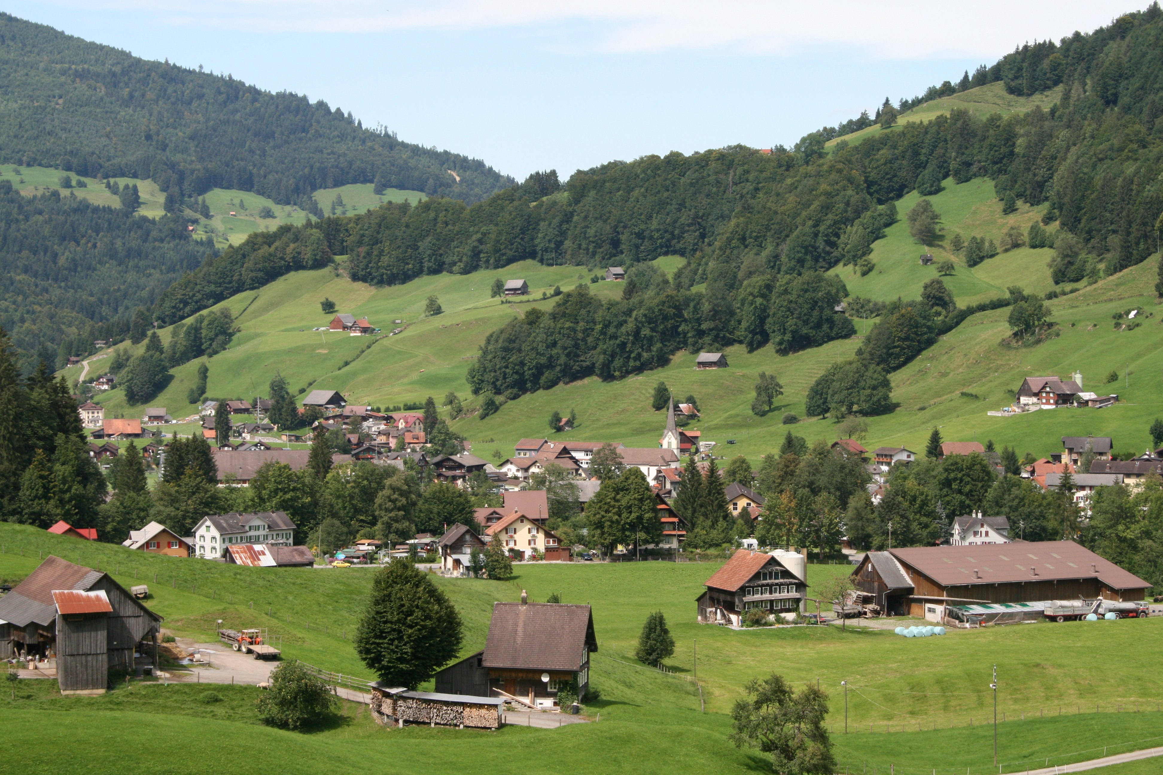 Vorderthal SZ